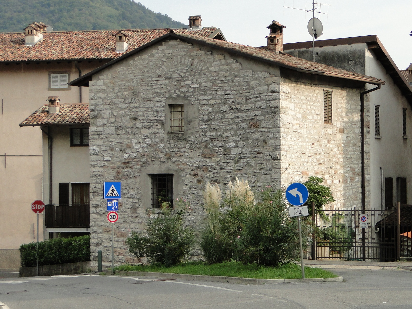 Torre Pelliccioli (XV secolo), Nembro (BG)